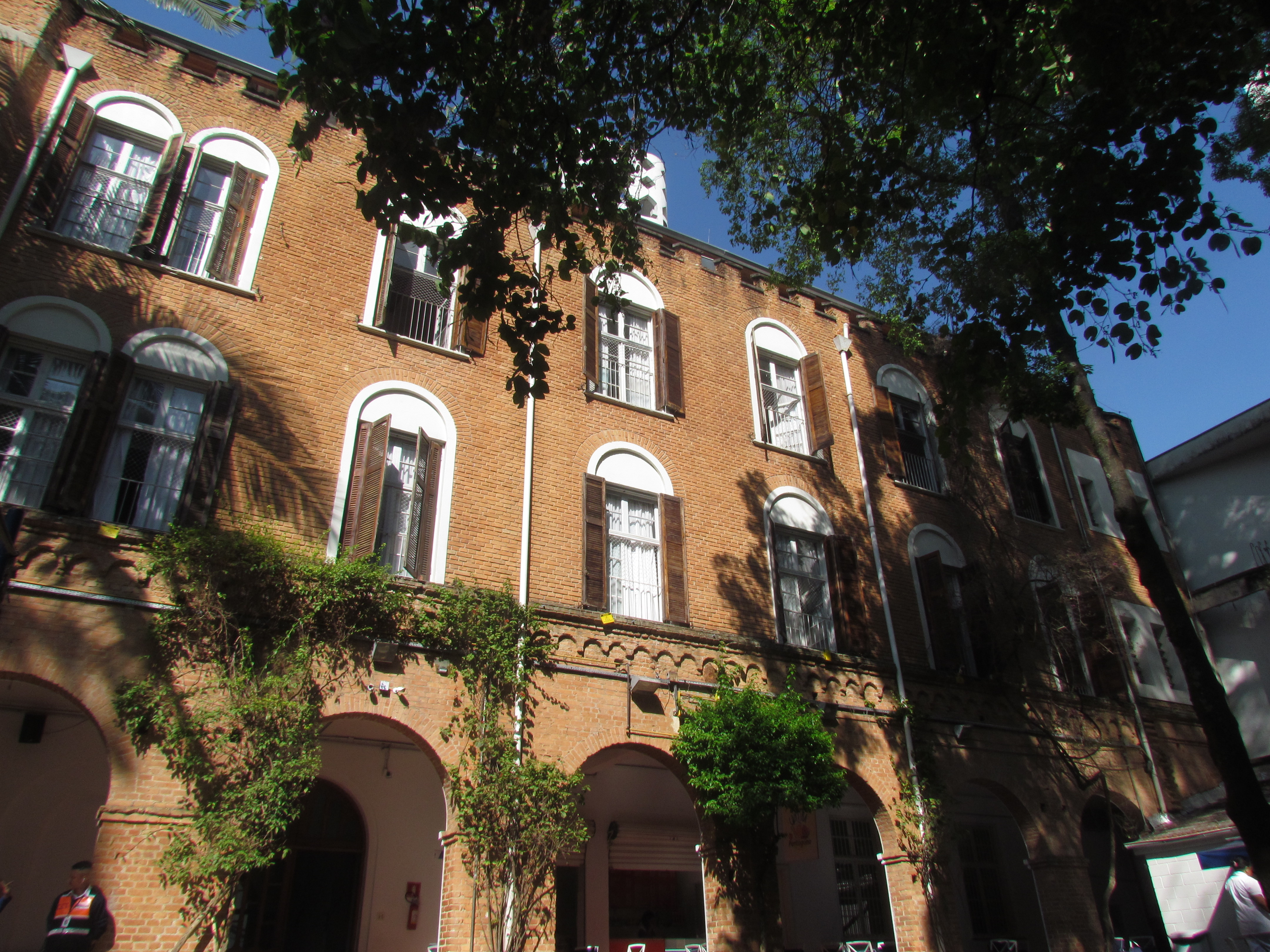 Parte externa Convento de Santo Alberto, hoje ocupado pelo Colégio Pentágono, em São Paulo (SP), Brasil.